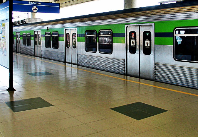 Metrorec - Estação Imbiribeira 2 - Recife, Pernambuco, Brasil